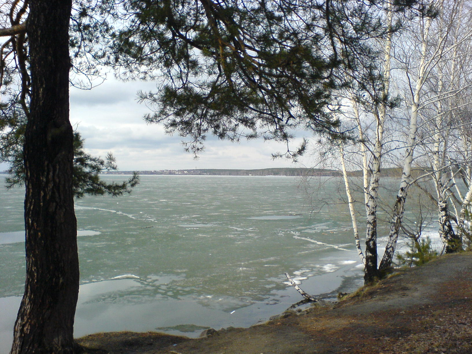 Шарташское озеро